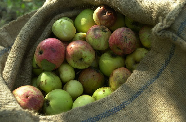 Sagarrak biltzen.